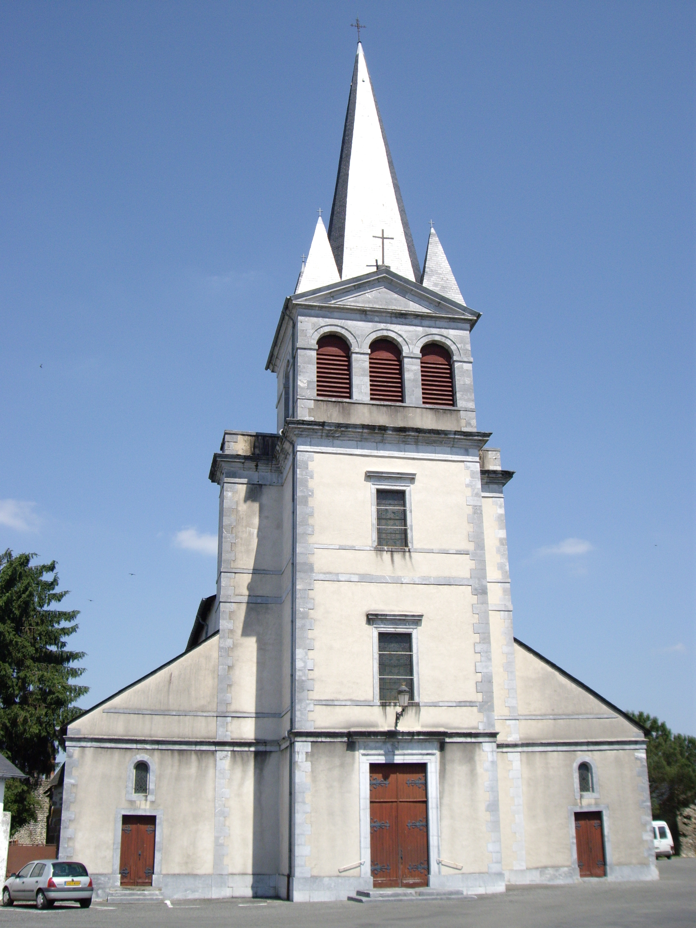 Église Saint-Laurent de Pontacq (64)